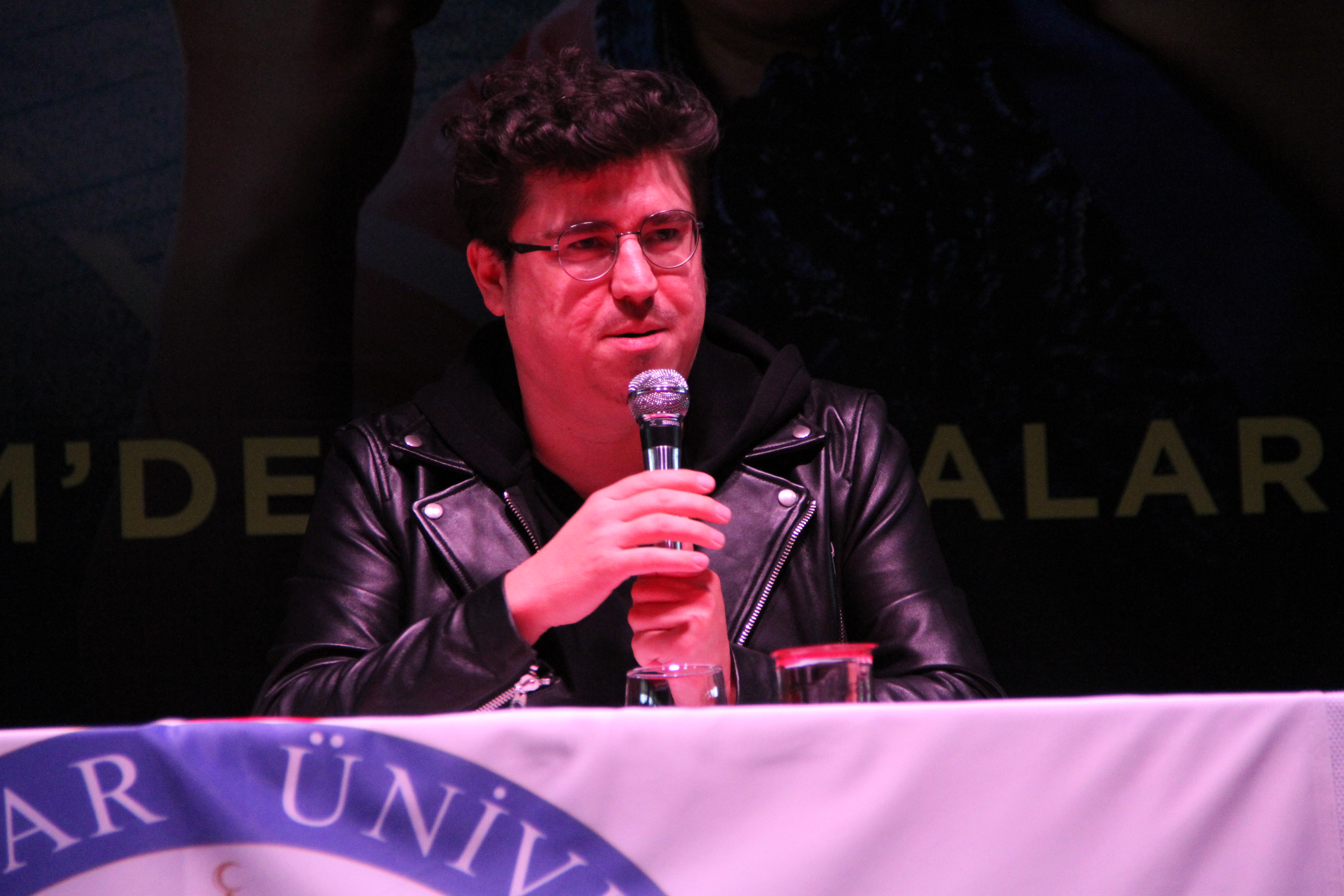 Oyuncu, senarist İbrahim Büyükak, Kütahya Dumlupınar Üniversitesinde katıldığı bir söyleşide.